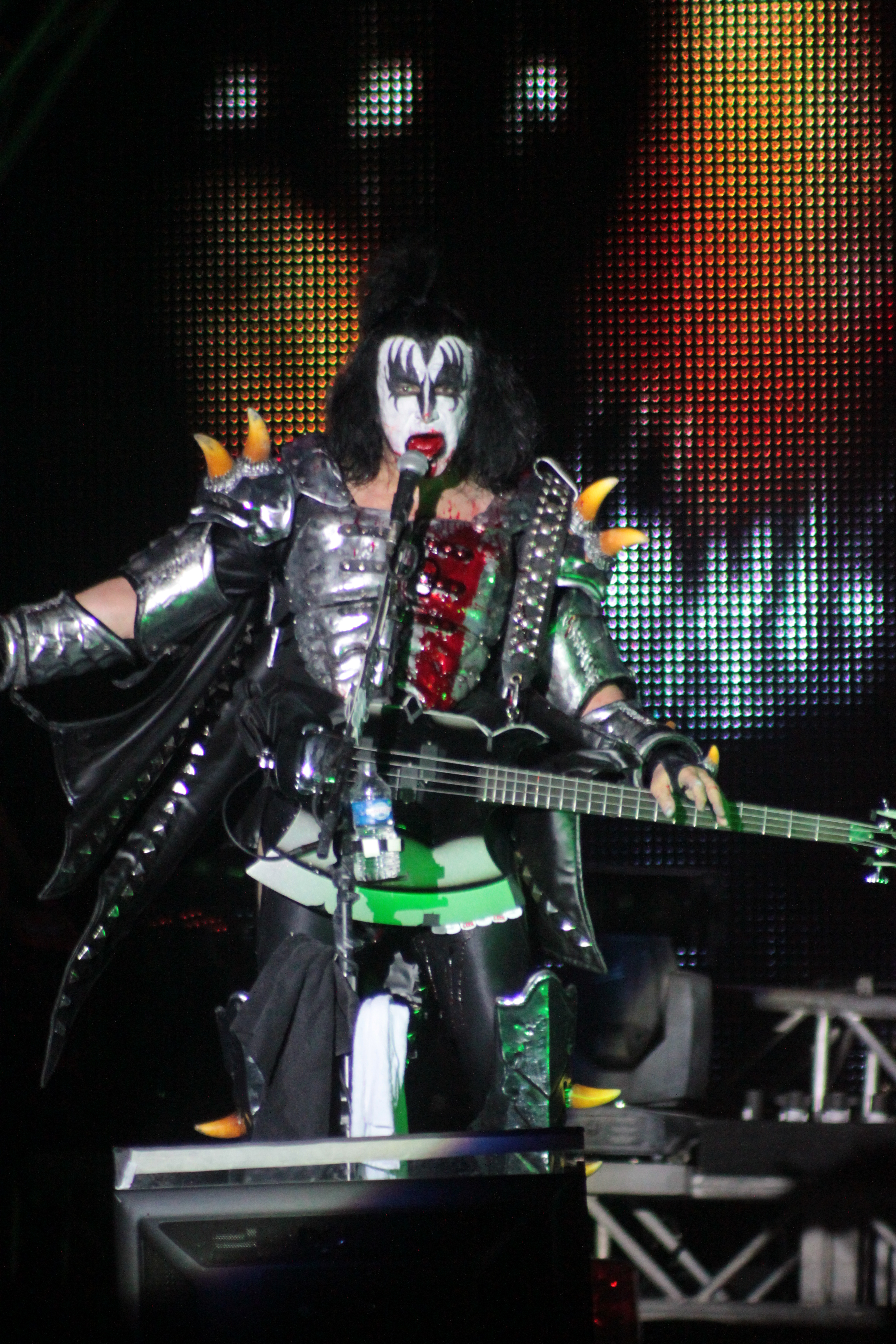 Gene Simmons, Kiss, Helfest 2013, Fr-44-Clisson.